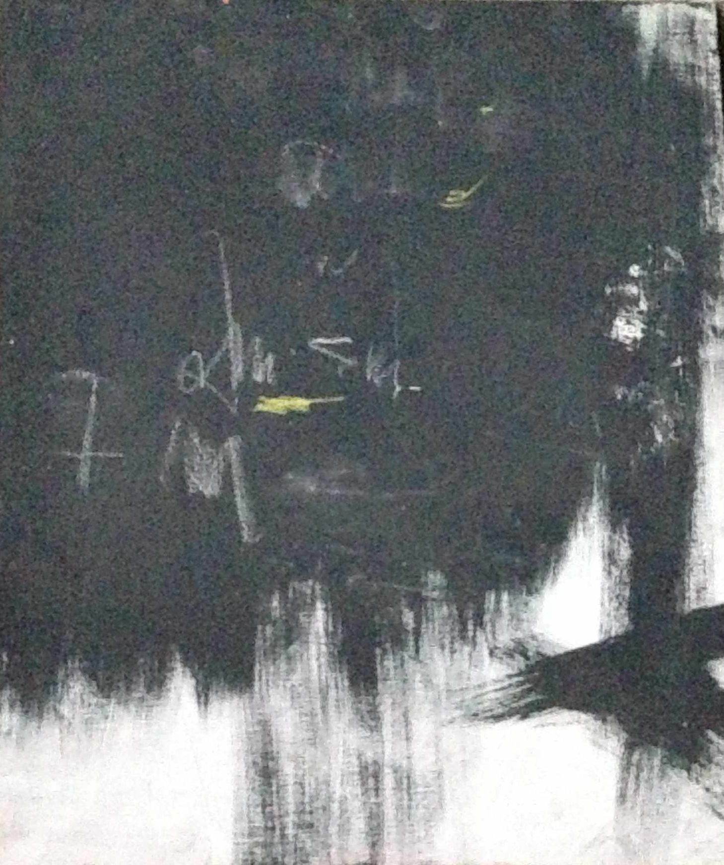 Fotografía original de l'obra d'Amadeu Font Bernades